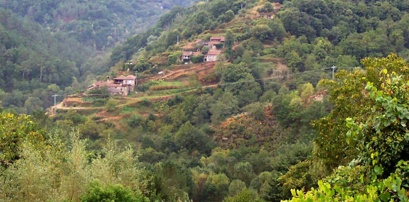 A Cuqueira, Temes, Carballedo